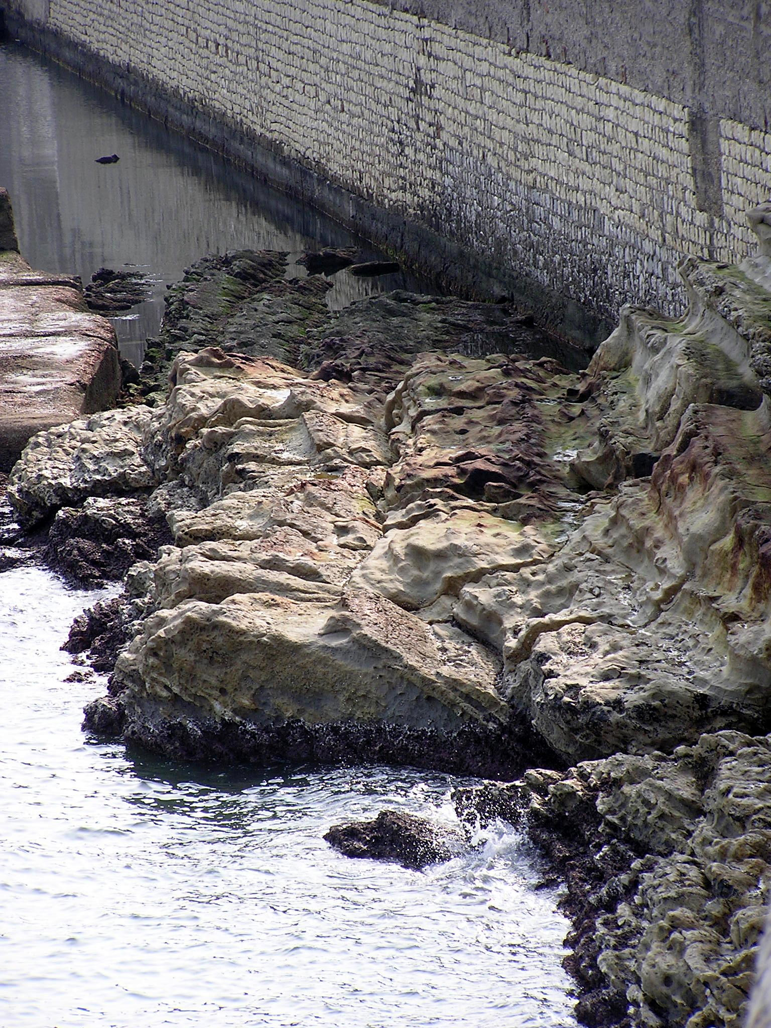 Ancona - parte dello scoglio di San Clemente non inglobata nell'interramento dei Cantieri Navali.